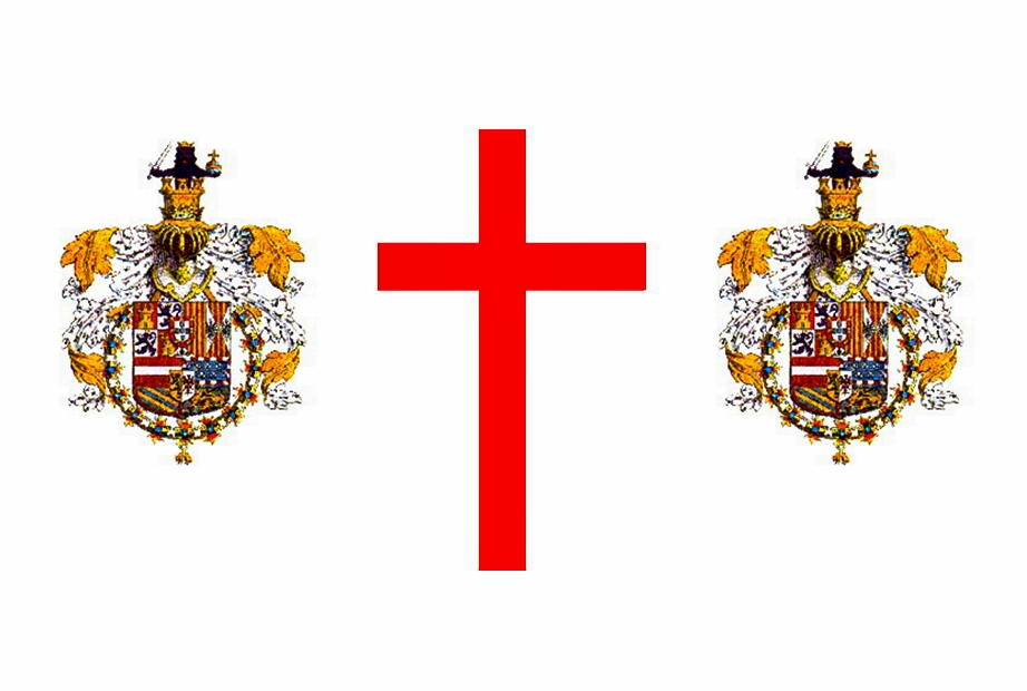 Tiene su origen en una orden de 25 de noviembre de1567 promulgada por el rey Felipe II instituyendo una milicia de guerra que sirva en las galeras y defienda las costas del Reino de los ataques de los piratas.